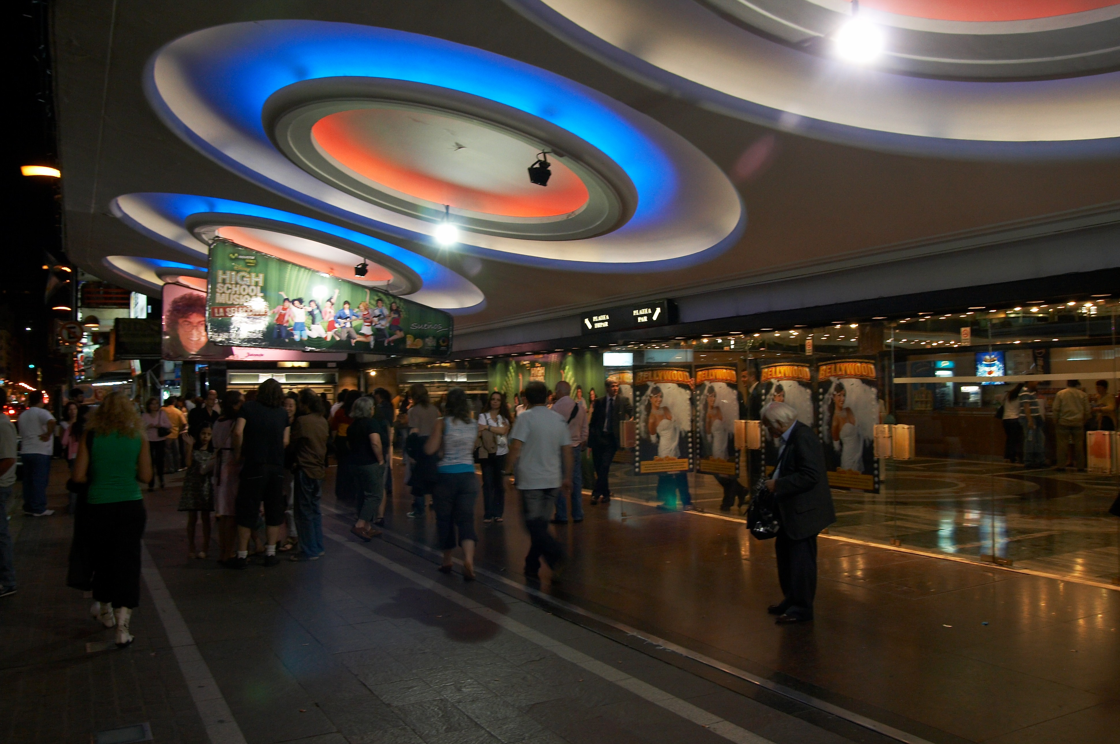 Teatro Opera, Avenida Corrientes, barrio de San Nicolás, Buenos Aires, Argentina.